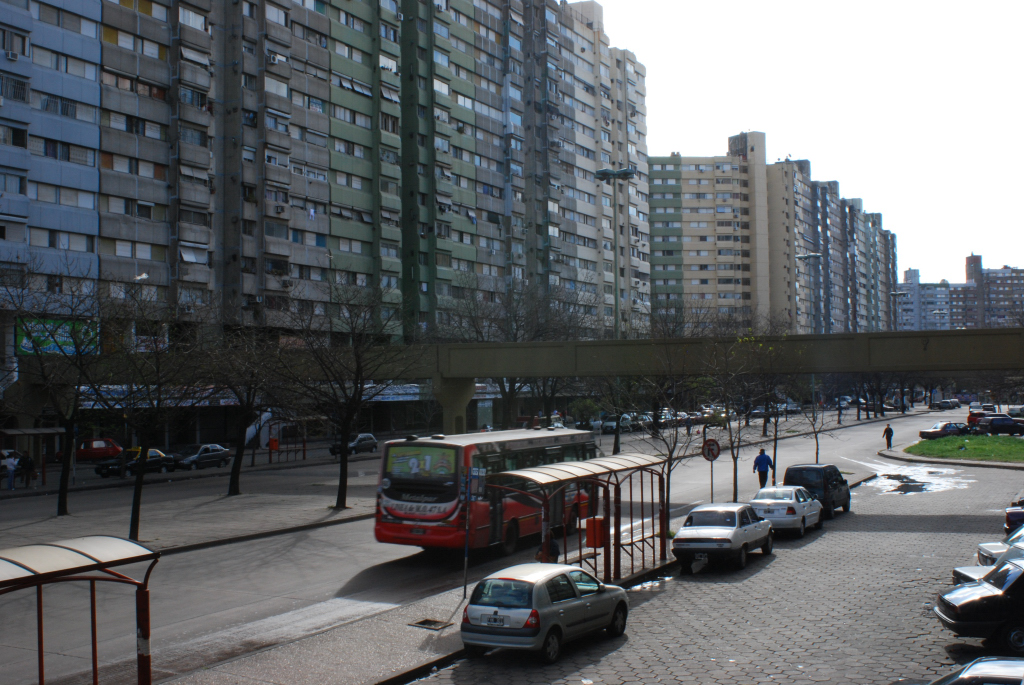 Paradas de colectivos en Av. Soldado de la Frontera una tarde de septiembre, barrio General Savio (Lugano 1 y 2).